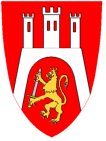 Stema „Scaunului Sighișoarei” (în germană Stuhl Schäßburg, în maghiară Segesvár szék), unitate administrativă a sașilor transilvăneni.